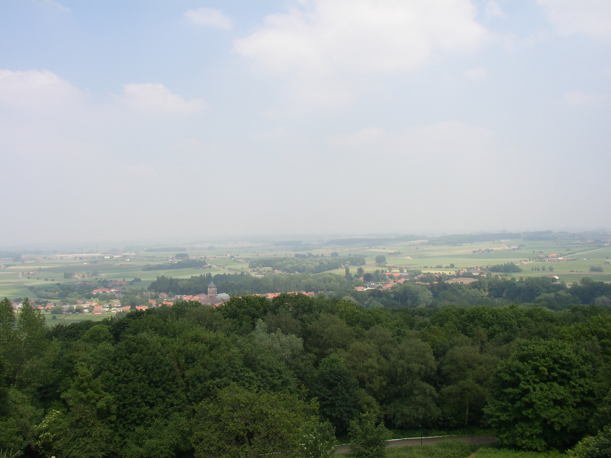 Zicht vanop de uitkijktoren op de Kemmelberg